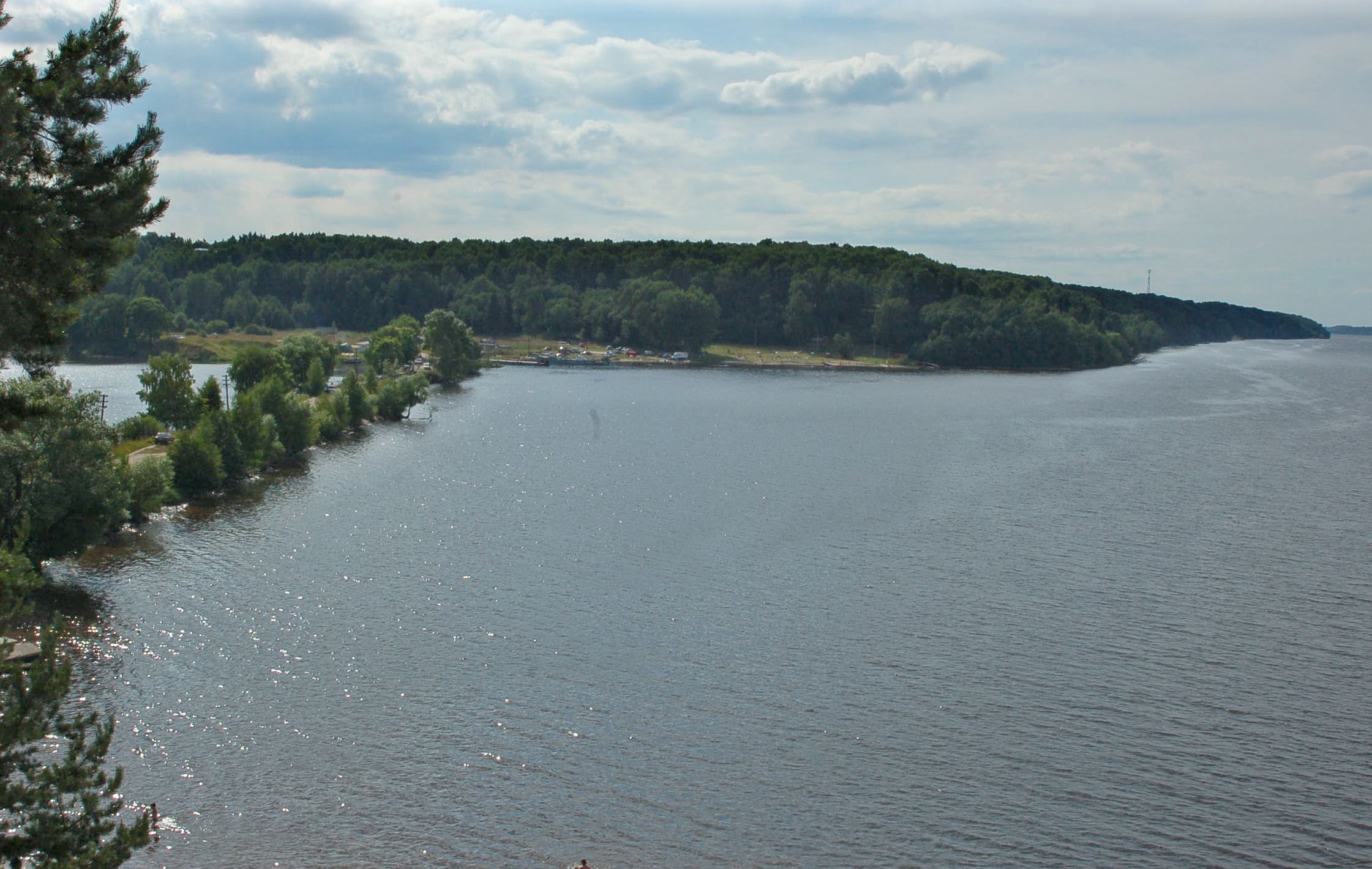 Вид с мыса Влюбленных